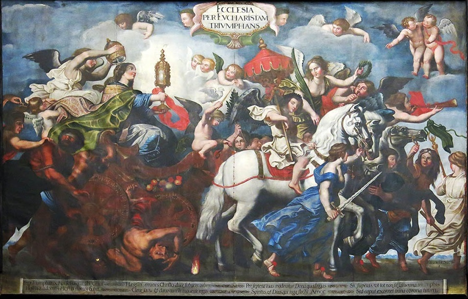 Triunfo de la Iglesia, o Triunfo de la Iglesia sobre la herejía, Valladolid,Real iglesia de san Miguel y san Julián